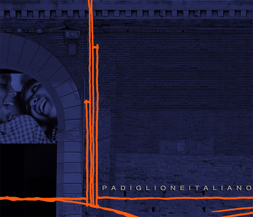 Padiglione Italiano alla Biennale di Venezia